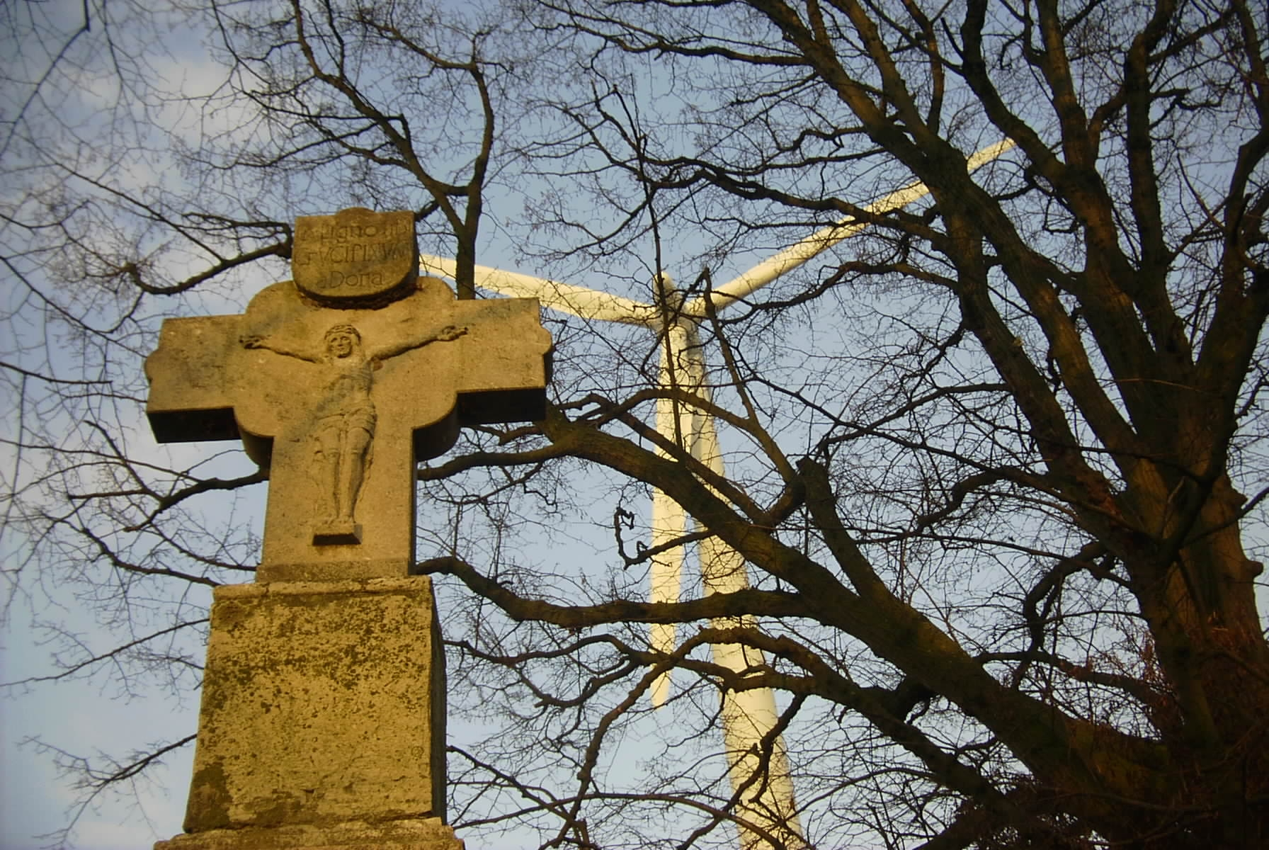 Summary Tradition und Moderne: Hagelkreuz und Windkraftanlage bei Linnich-Körrenzig. Hagelkreuze wurden als religiöse Schutzzeichen für Feld und Flur errichtet und sind noch von einzelnen alten Bäumen umgeben. eigenes Foto, März 2006